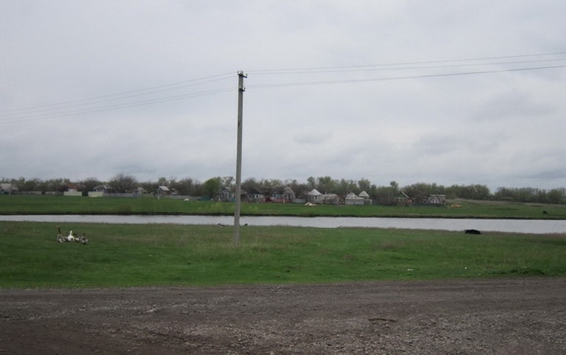 На фото улица "Полевая" в селе Масловка Первомайского района Харьковской области, впереди речка Орелька.